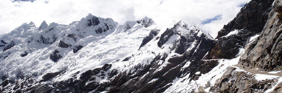 Carretera trasandina Punta Olimpica 4932 msnm